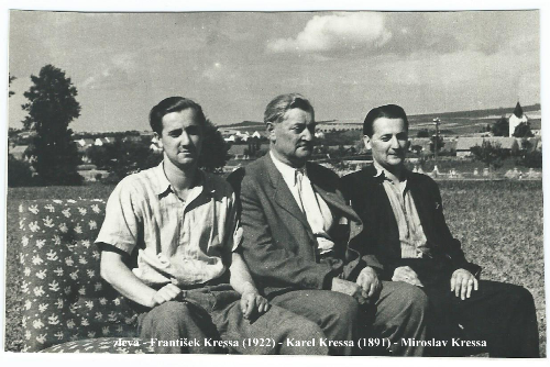 Fotka Karla Kressy a jeho dvou synů - Fratiška a Miroslava